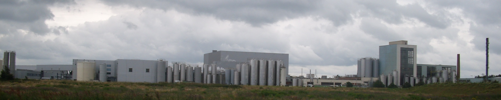 Campina Aalter - langs kanaal Gent-Brugge-Oostende - Oost-Vlaanderen - België